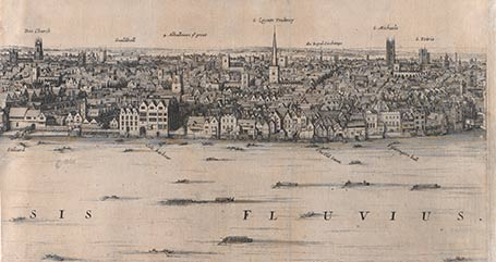 Česky: výřez z pohledu na Londýn